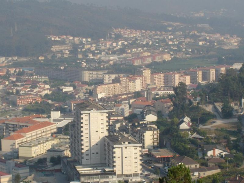 Póvoa de Lanhoso'dan bir görünüş.